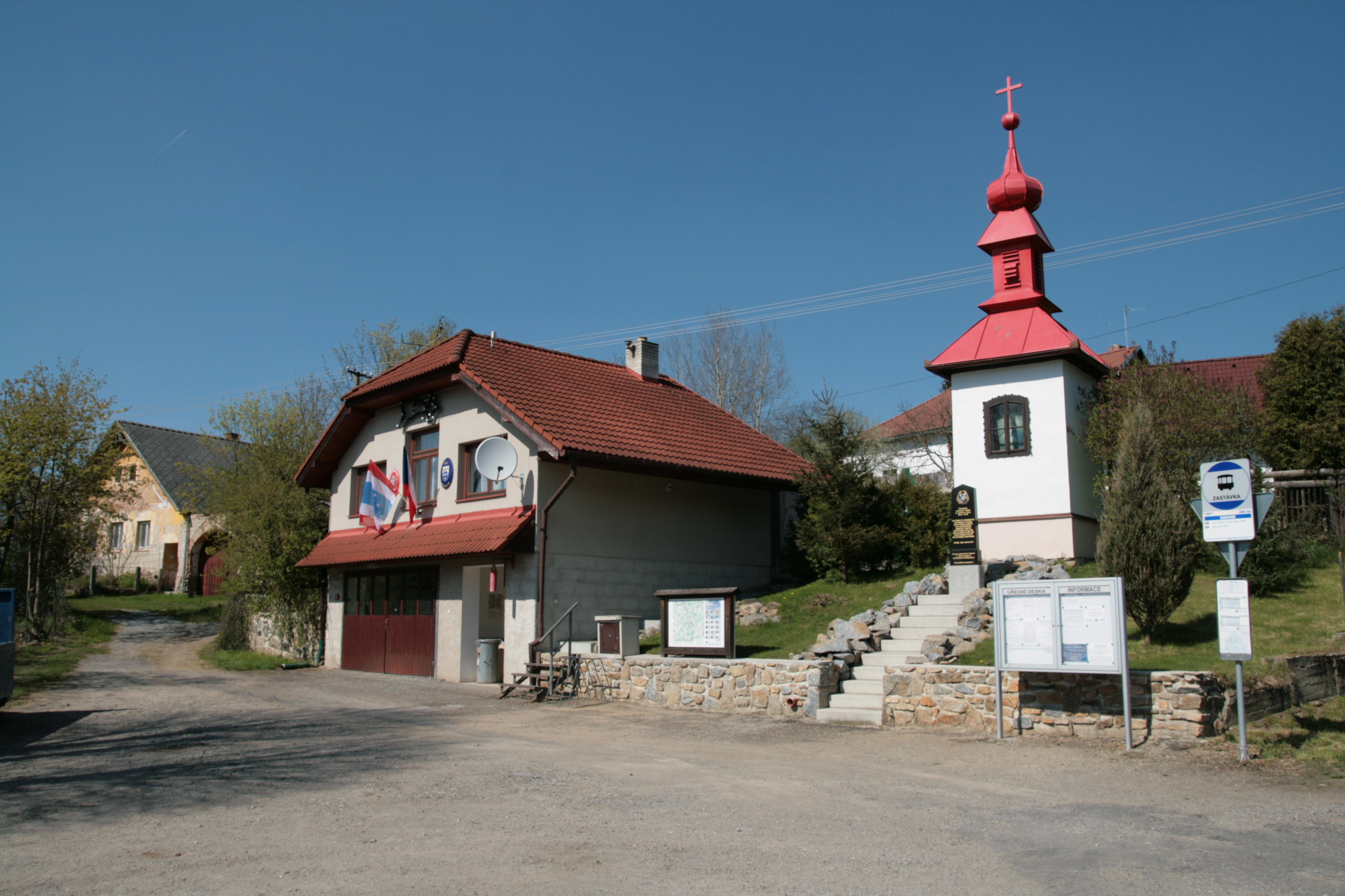 Obec Borovník v okrese Brno-venkov. Náves s hasičskou zbrojnicí, zvonicí a autobusovou zastávkou.